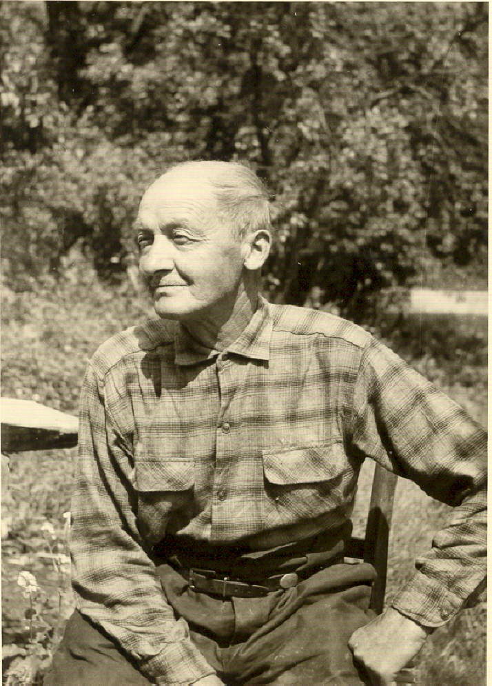 Rombach-le-Franc : Jean Munier en 1964